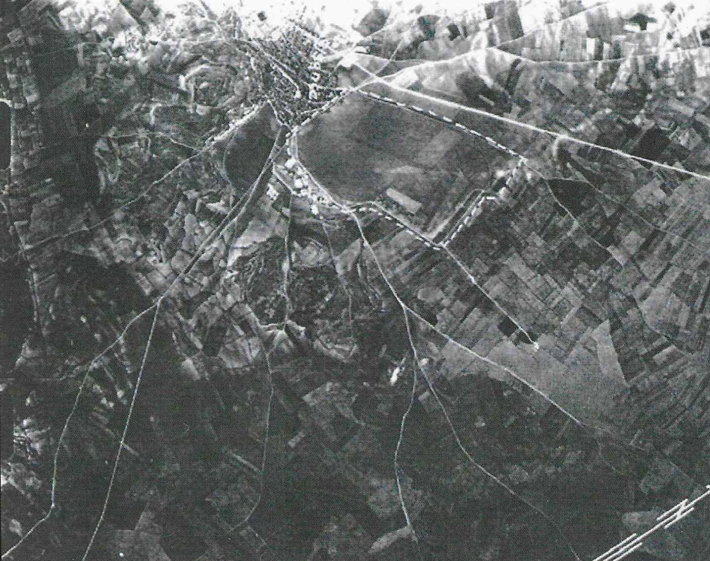 Aeródromo Sisante Guerra Civil Española Fuerzas Aéreas de la República Española